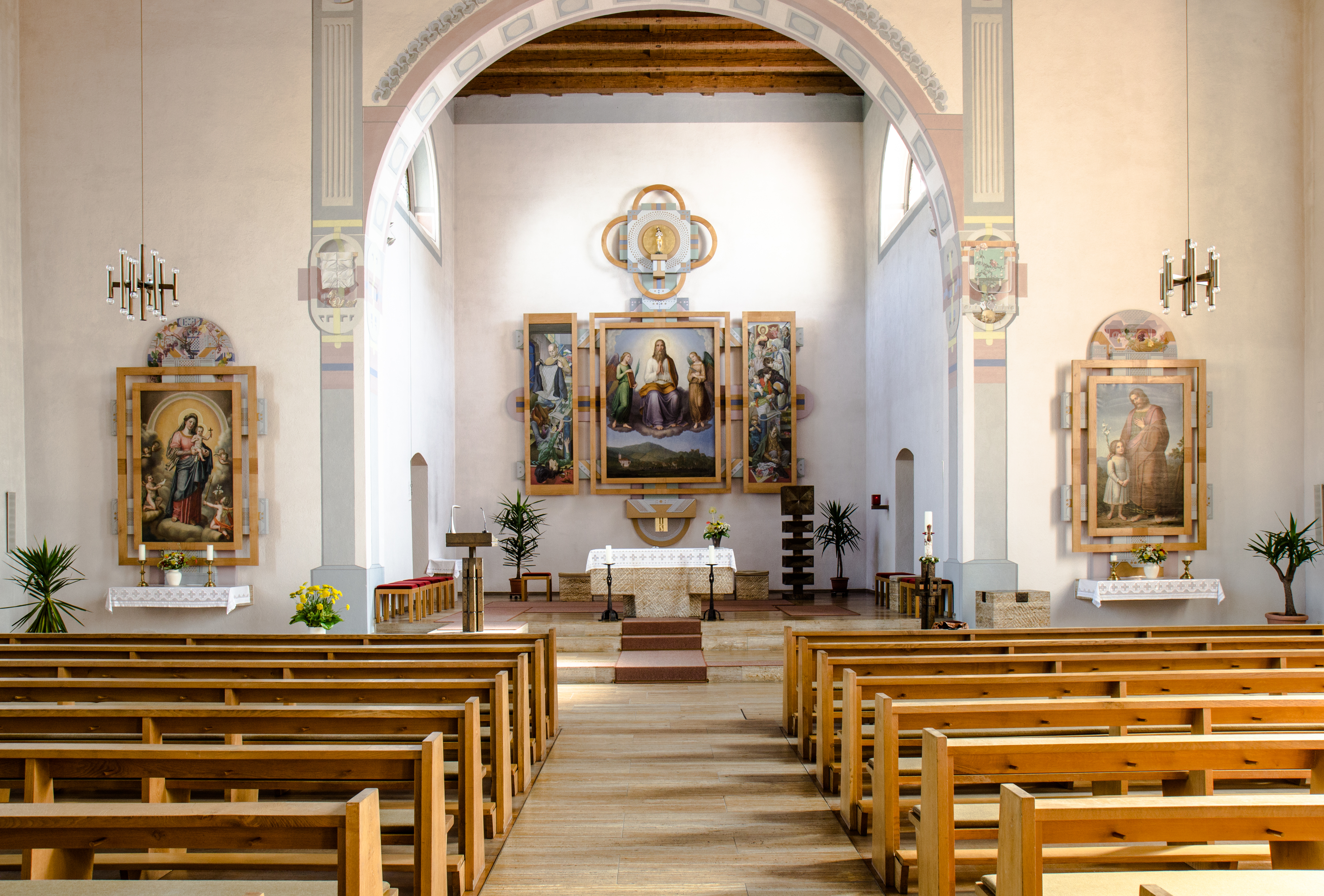 St. Bartholomäus (Ortenberg)